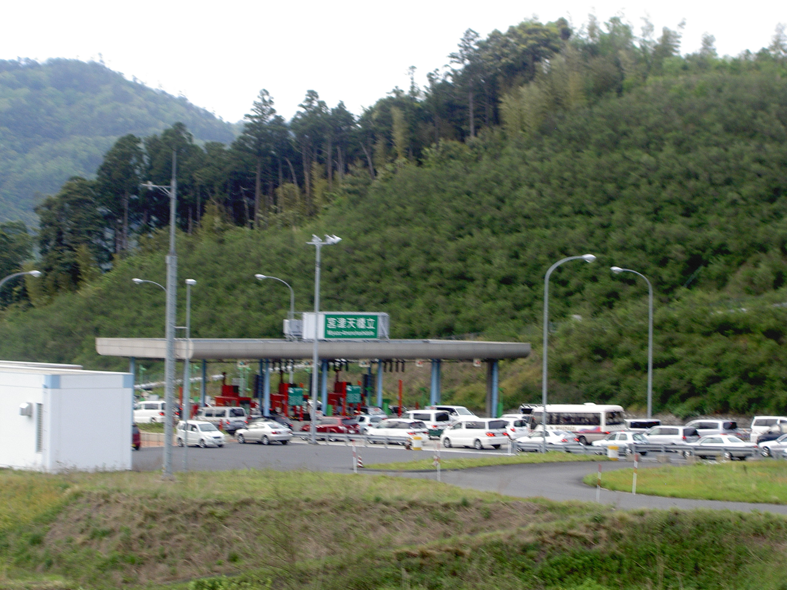 宮津天橋立インターチェンジ